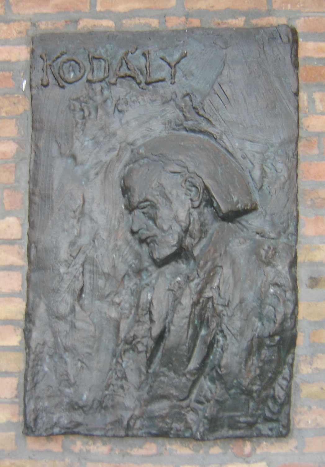 Kodály Zoltán (1882-1967) domborműve a szegedi Nemzeti Emlékcsarnokban a Dóm tér nyugati oldalának árkádjai alatt. A dombormű Vígh Tamás alkotása